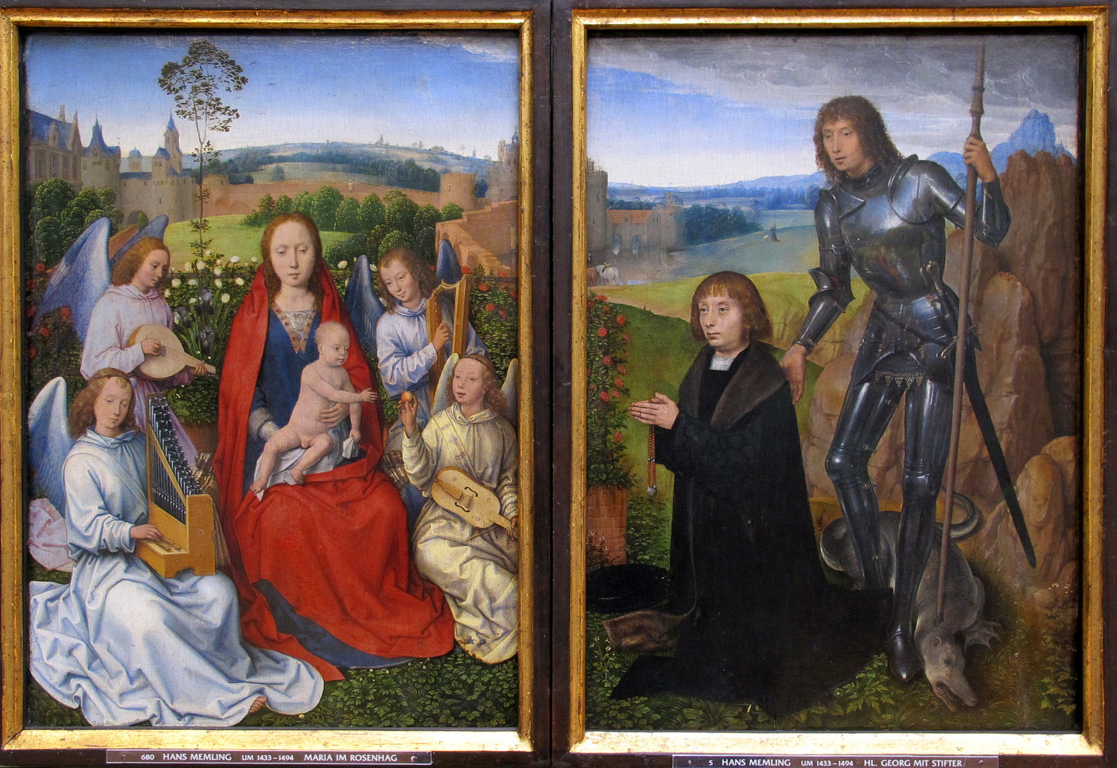 diptych